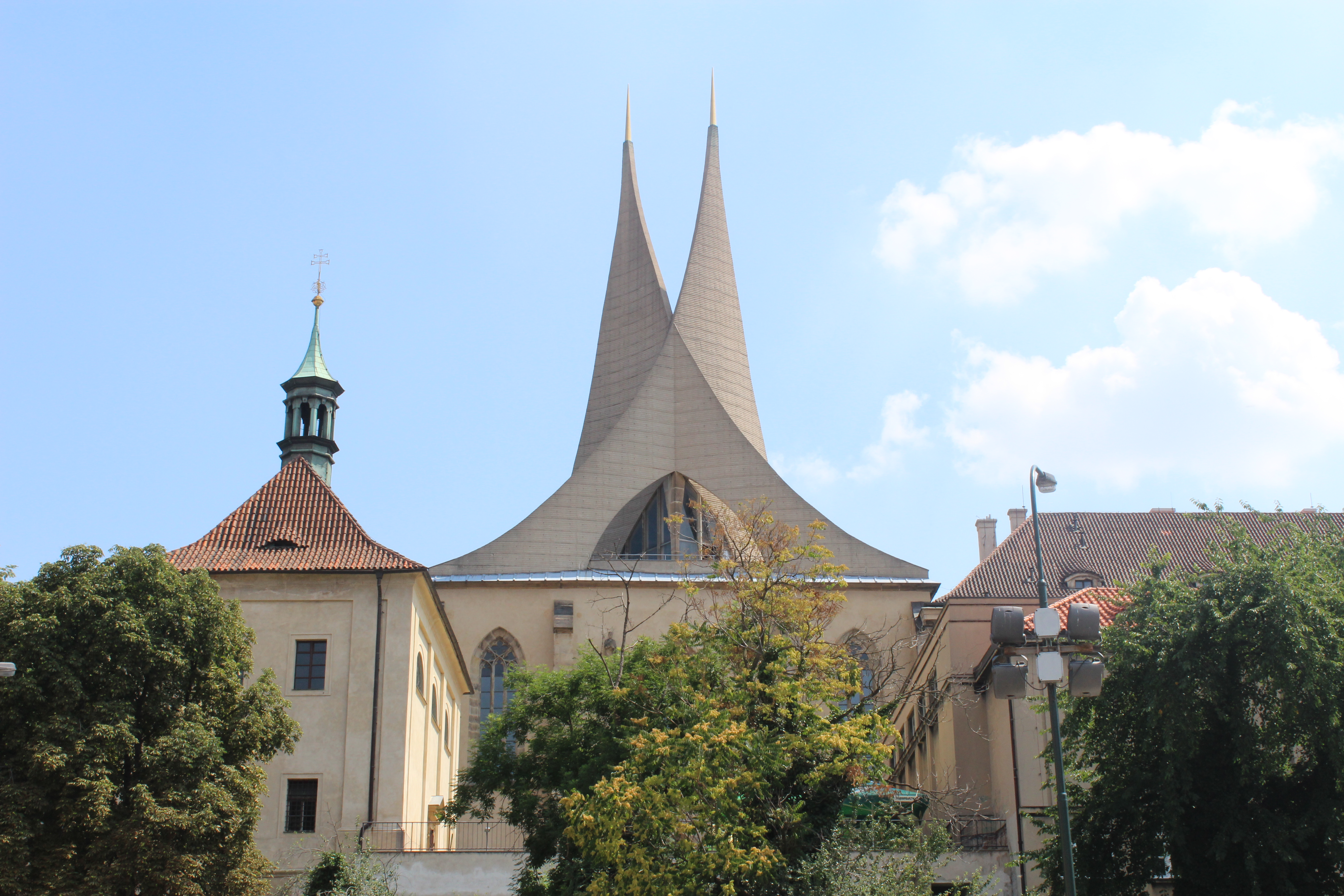 Snímky benediktinských klášterů, se kterými se RNDr. Jan Maňák se přihlásil do mezinárodní fotografické soutěže VIA BENEDICTINA K účasti v soutěži jej vyzval Mgr. Dušan Foltýn jeden z organizátorů a přední český monasteriolog . V soutěži Honza Maňák reprezentoval i svého zaměstnavatele Atelier Svatopluk, o.p.s. v Litni,, který pro něj s Úřadem práce Beroun vytvořil chráněné pracovní místo fotograf a propagovat krásy Litně – Berounska a Karlštejnska. Proto také zamířil s fotoaparátem na 4 místa spojená s benediktinským řádem - Břevnov a Emauzy v Praze, Sv. Jan pod Skalou a Panenské Břežany a pro soutěž vybral 10 snímků. V polském Krakově byl oceněn snímek sv. Jana pod Skalou.